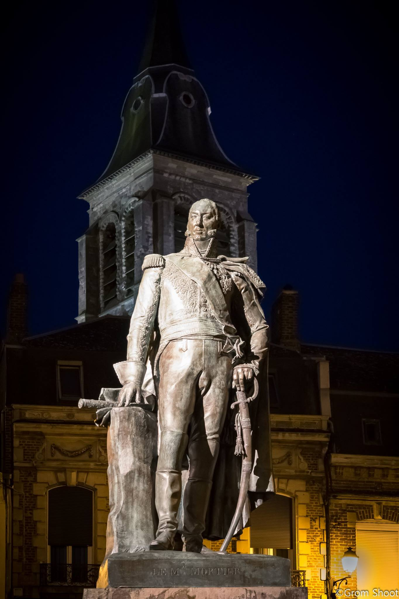 Statue du Marchéchal Mortier